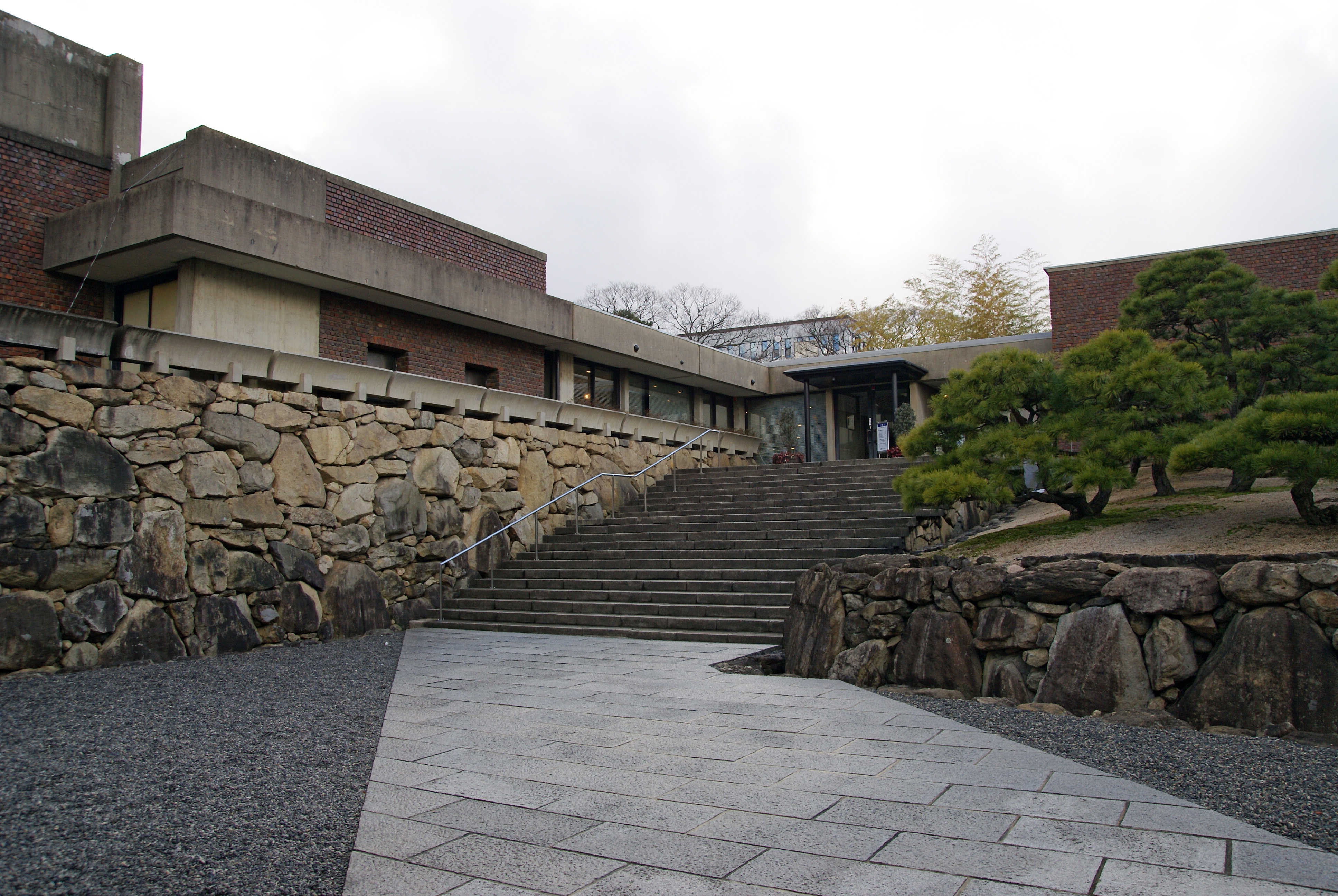 HAYASHIBARA MUSEUM OF ART in Okayama, Okayama prefecture, Japan